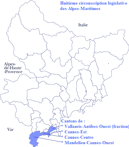 Carte de la huitième circonscription législative des Alpes-Maritimes